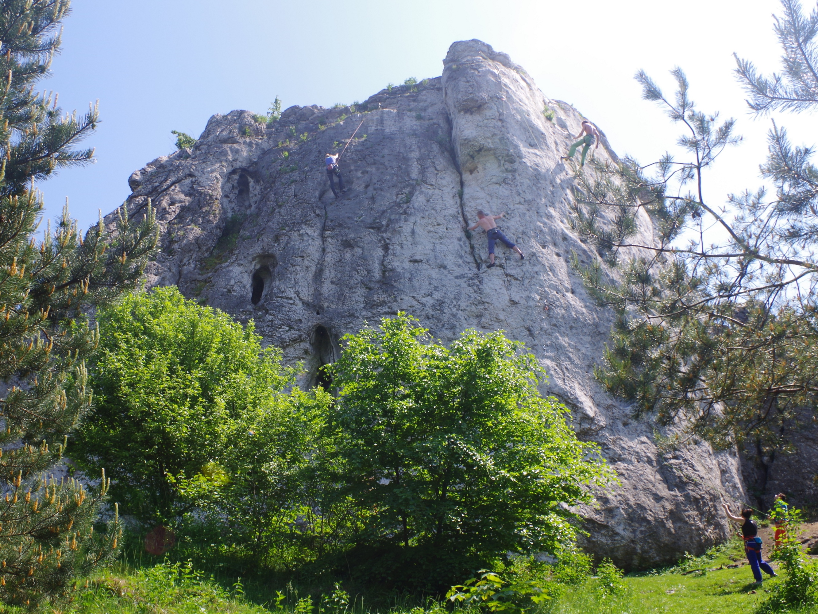 Skała Słoń na Wielkim Grochowcu w Ryczowie